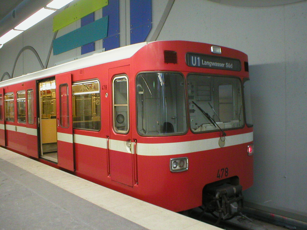 Zugtyp DT1 der Nürnberger U-Bahn